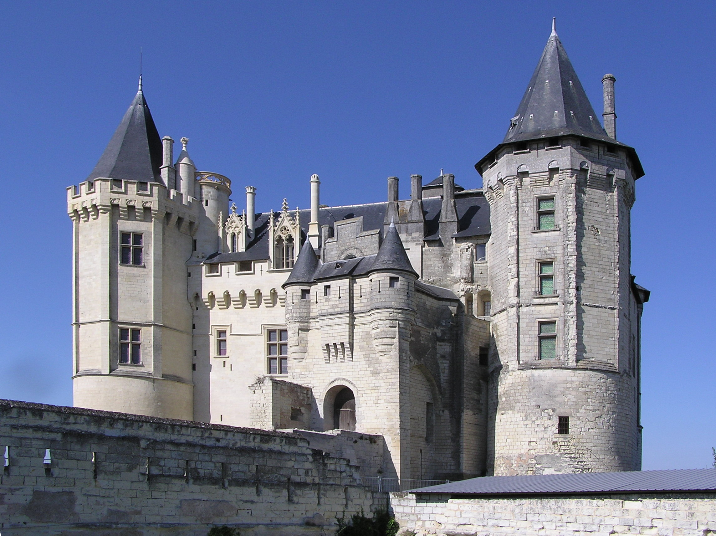 Avant-corps d'entrée du château de Saumur.